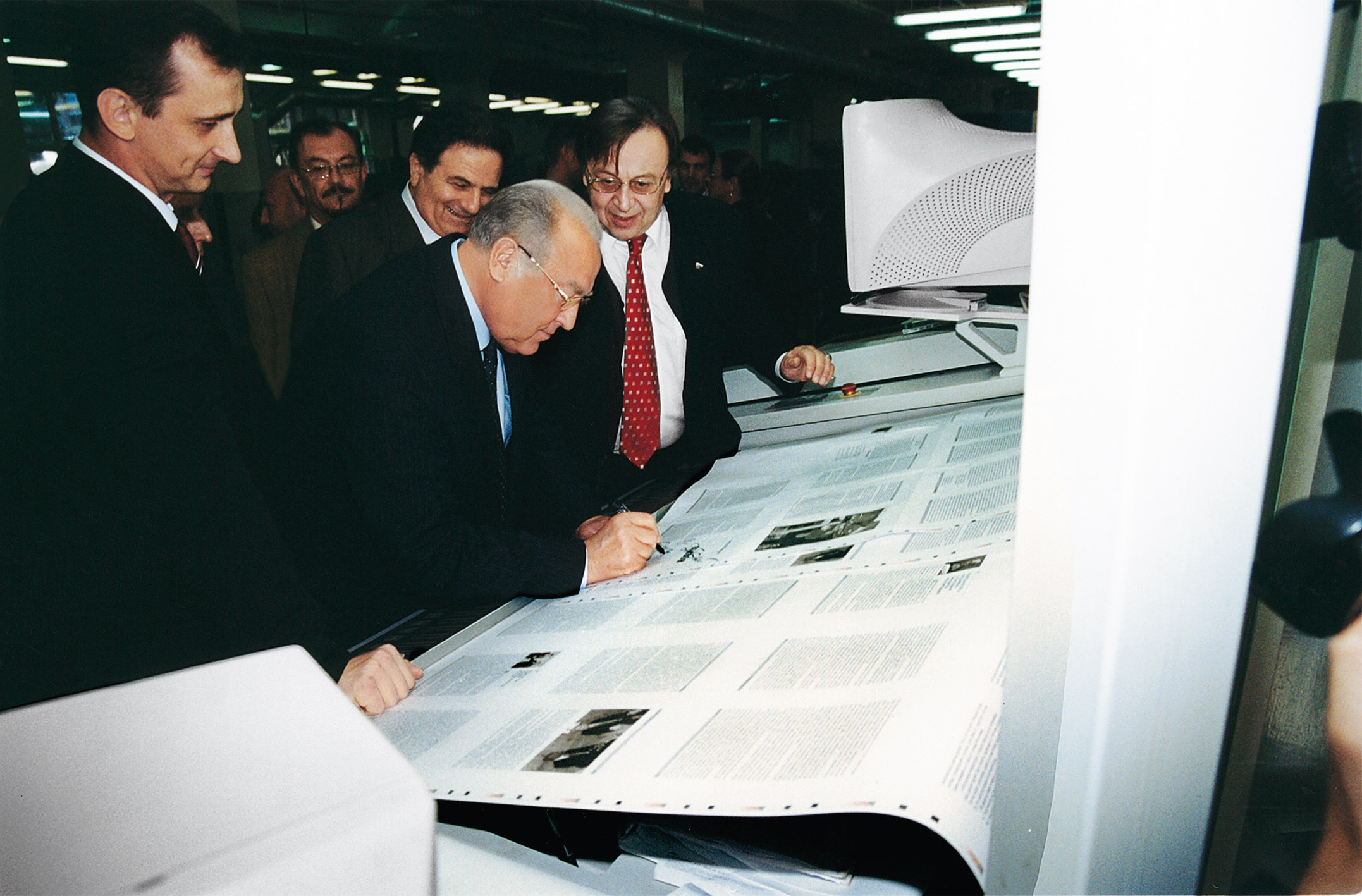 Киев. Виктор Черномырдин подписывет печатные листы своей книги «Вызов» в украинской типографии.